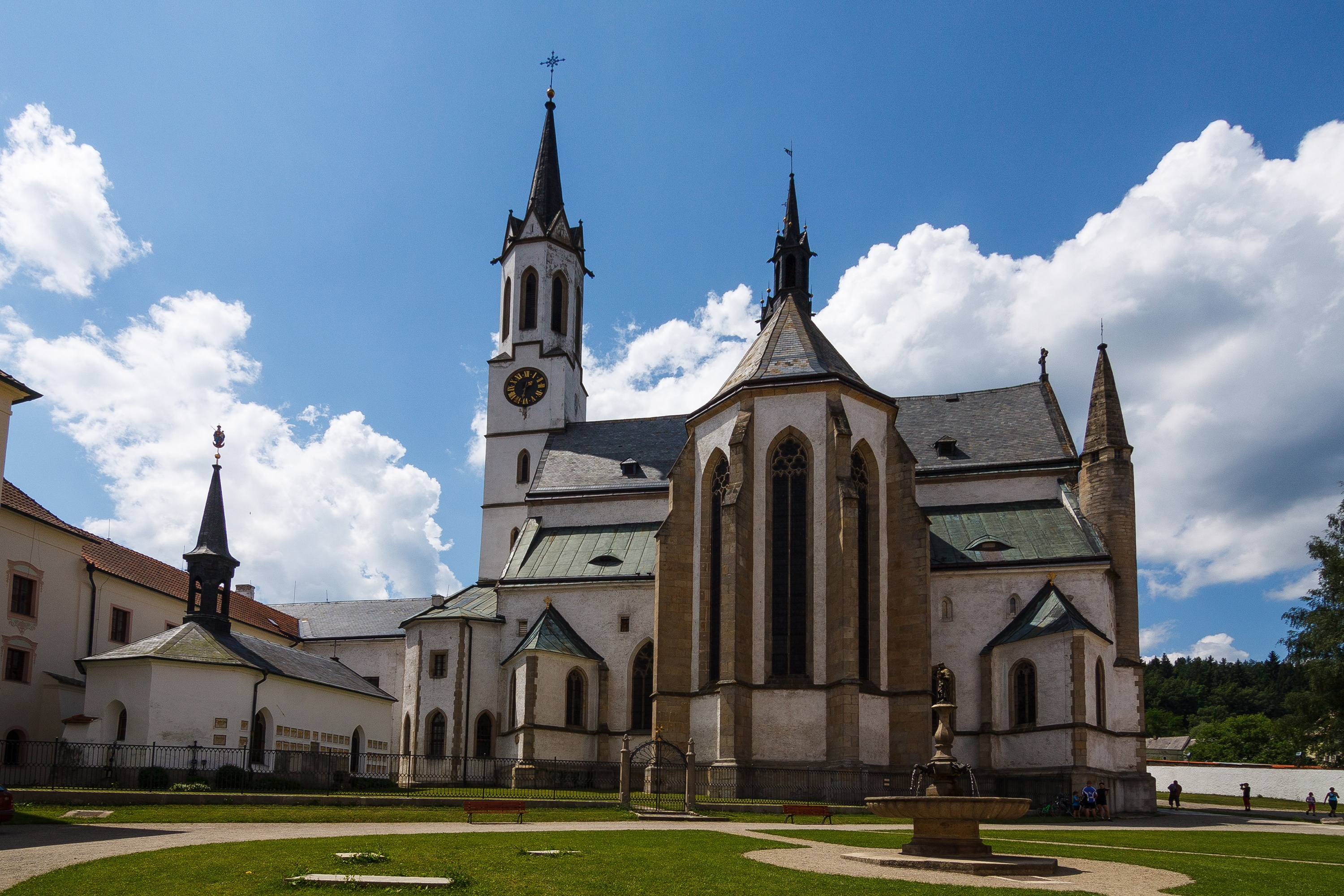 Klášter (Vyšší Brod), Vyšší Brod.